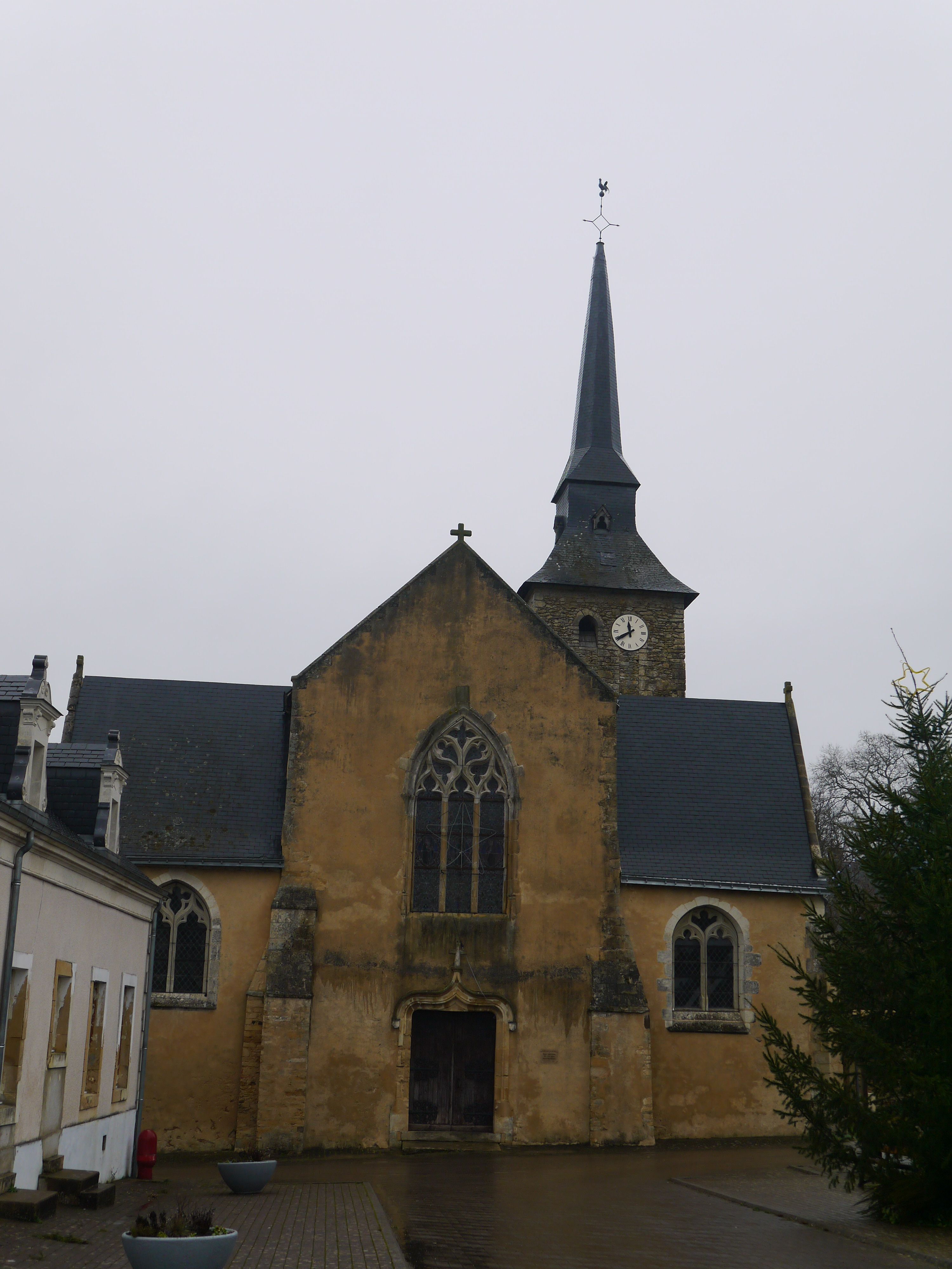 L'église Saint-Pierre.